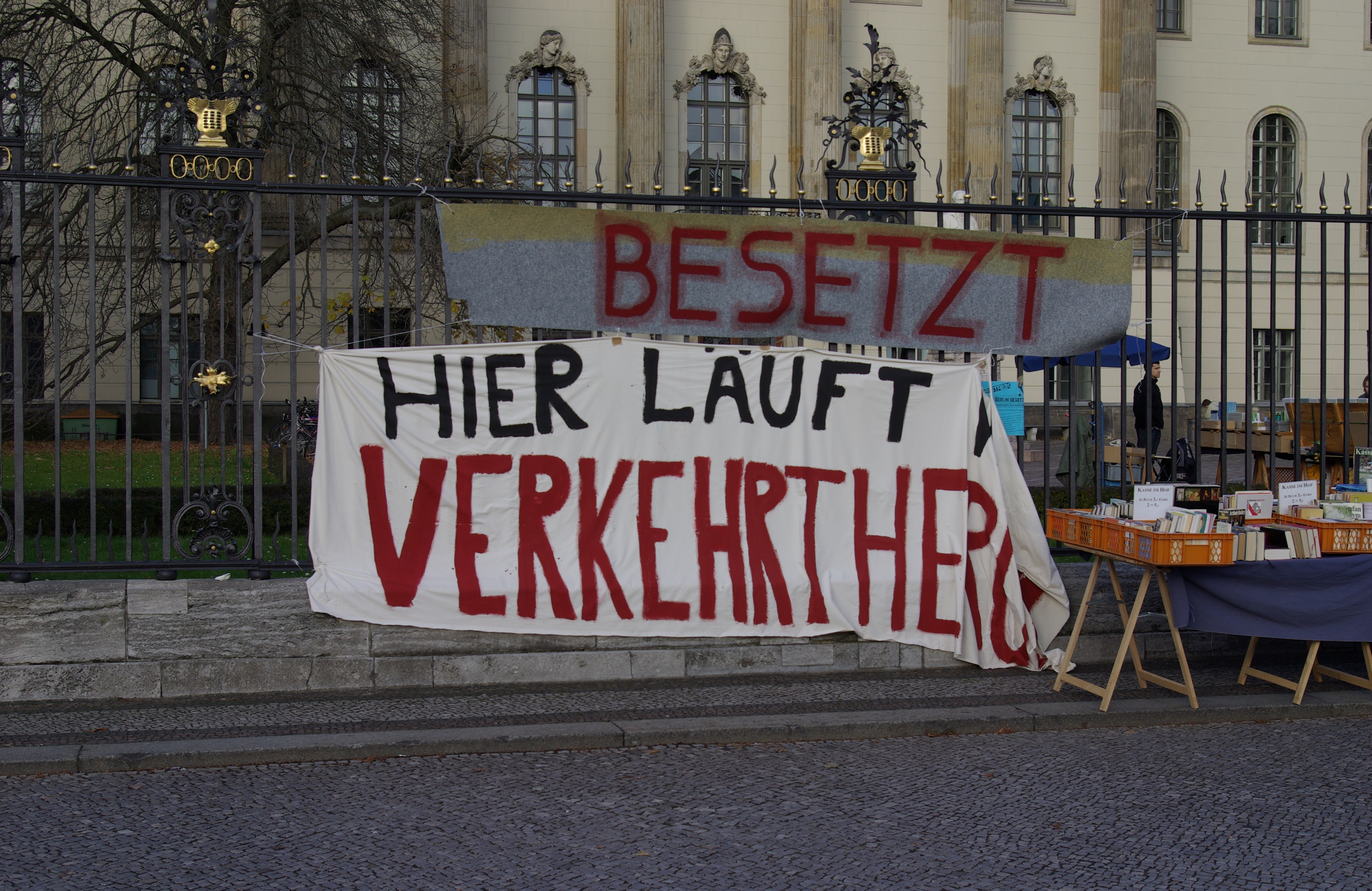 Studentenprotest an der Humboldt-Universität zu Berlin